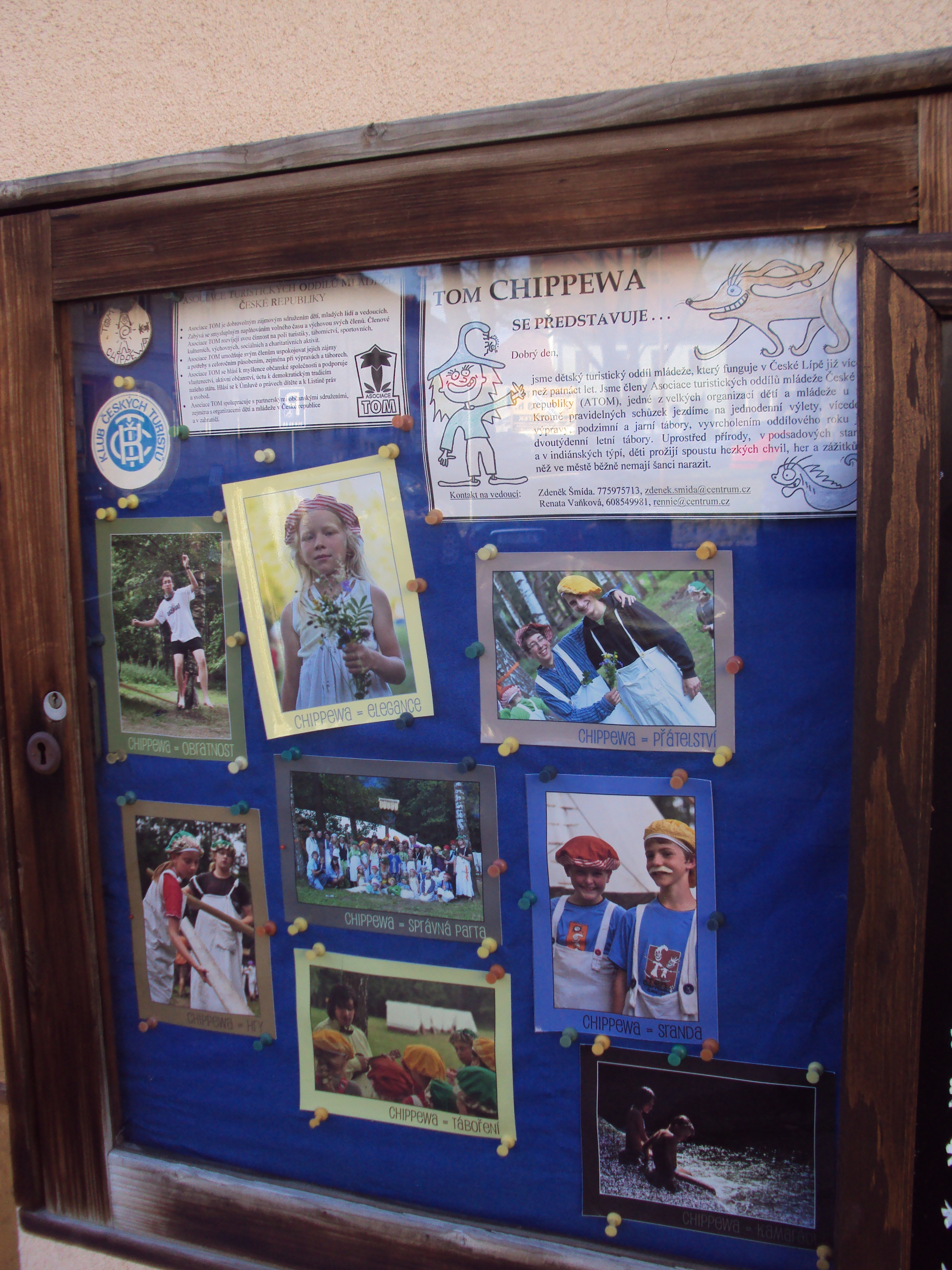 Česky: Vývěska tomíků v České Lípě